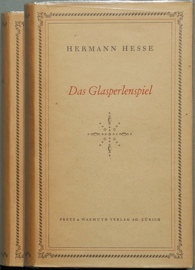 Hesse, Hermann: Das Glasperlenspiel. Versuch einer Lebensbeschreibung des Magister Ludi Josef Knecht samt Knechts hinterlassenen Schriften. 2 Bände, 452, 442 Seiten. Zürich: Fretz & Wachsmuth 1943. Erstdruck (Wilpert/Gühring² 251)